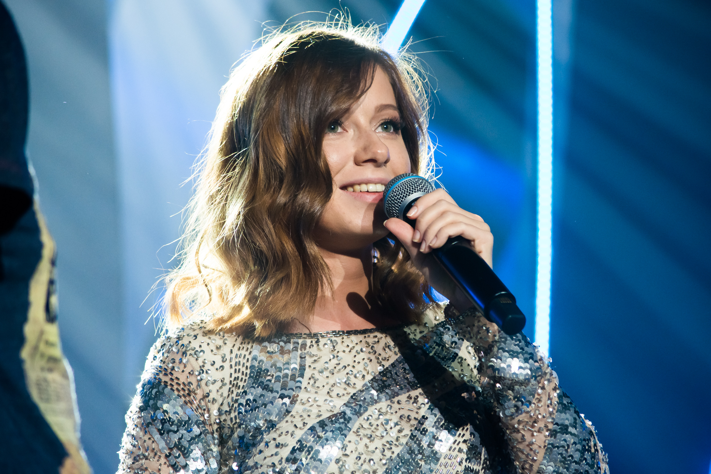 Юлия Савичева на Рождественской Песенки года 2015